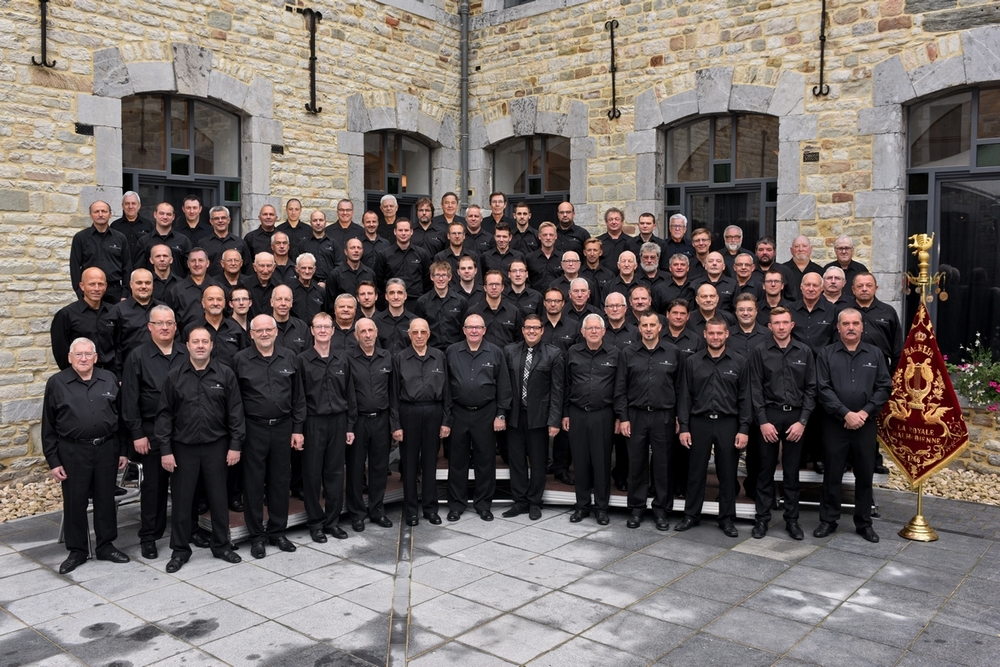 Les chanteurs de la Royale Malmédienne en 2015